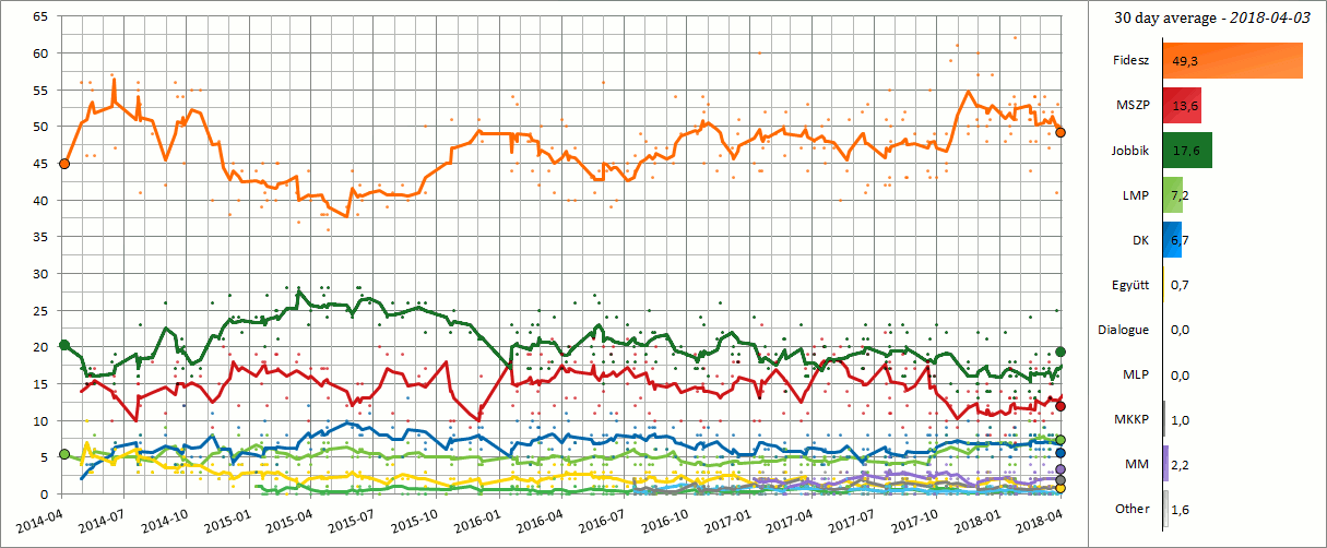 Sondages d'opinion hongrois, moyenne lissée sur 30 jours, 2014-2018 from